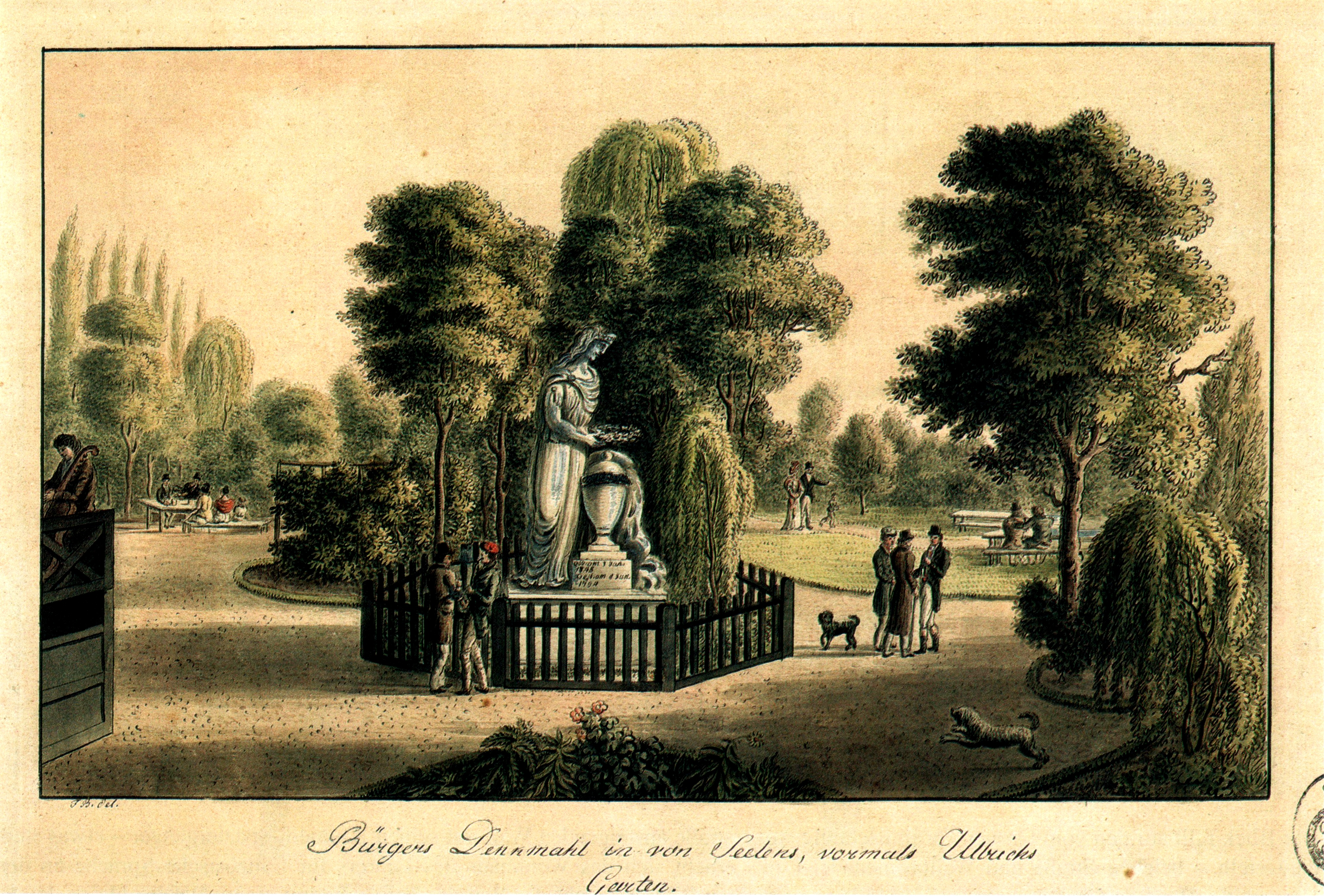 Bürgers Denkmahl (sic!) in von Seelens, vormals Ulrichs Garten. Das Denkmal für Gottfried August Bürger wurde auf Anregung Ludwig Christoph Althofs in einem Restaurantgarten vor dem Albanitor in Göttingen aufgestellt. Bildhauer waren die Brüder Ludwig Daniel Heyd und Johann Wolfgang Heyd aus Kassel.